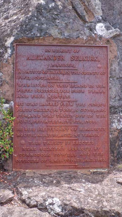 Gedenktafel für Alexander Selkirk an Selkirks Aussicht auf der Robinson-Crusoe-Insel